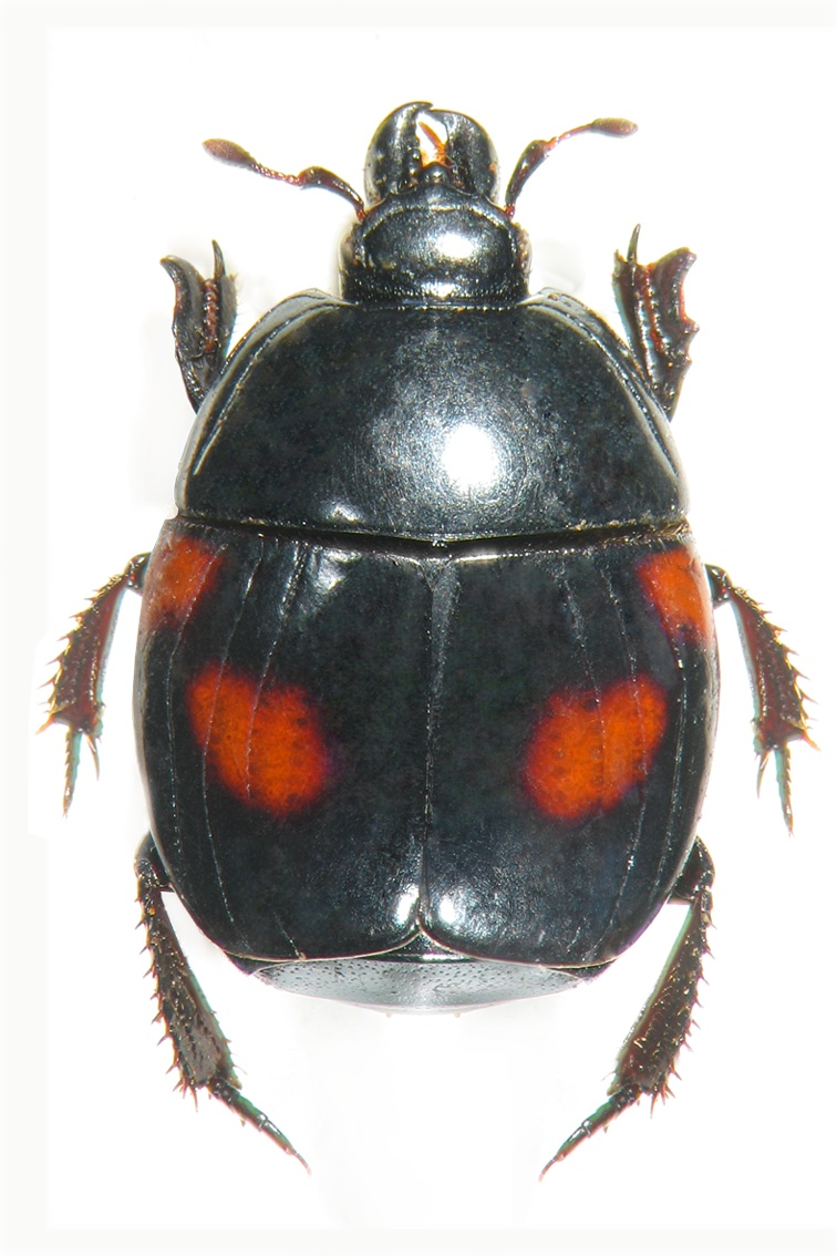 Habitus en vue dorsale de Hister quadrinotatus Scriba, 1790